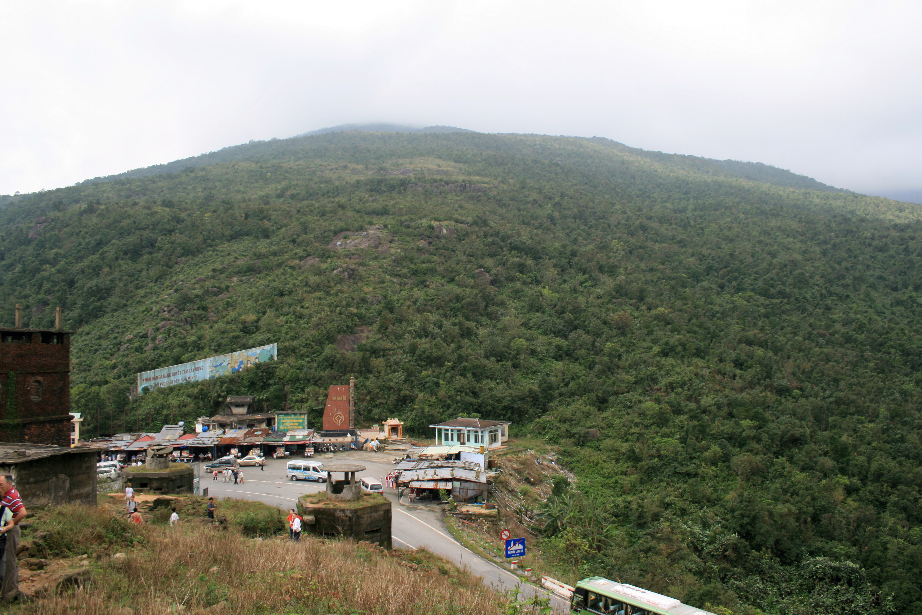 Đỉnh đèo Hải Vân. Một đèo nằm giữa tỉnh Thừa Thiên Huế và Đà Nẵng (thuộc tỉnh Quảng Nam trước đây).